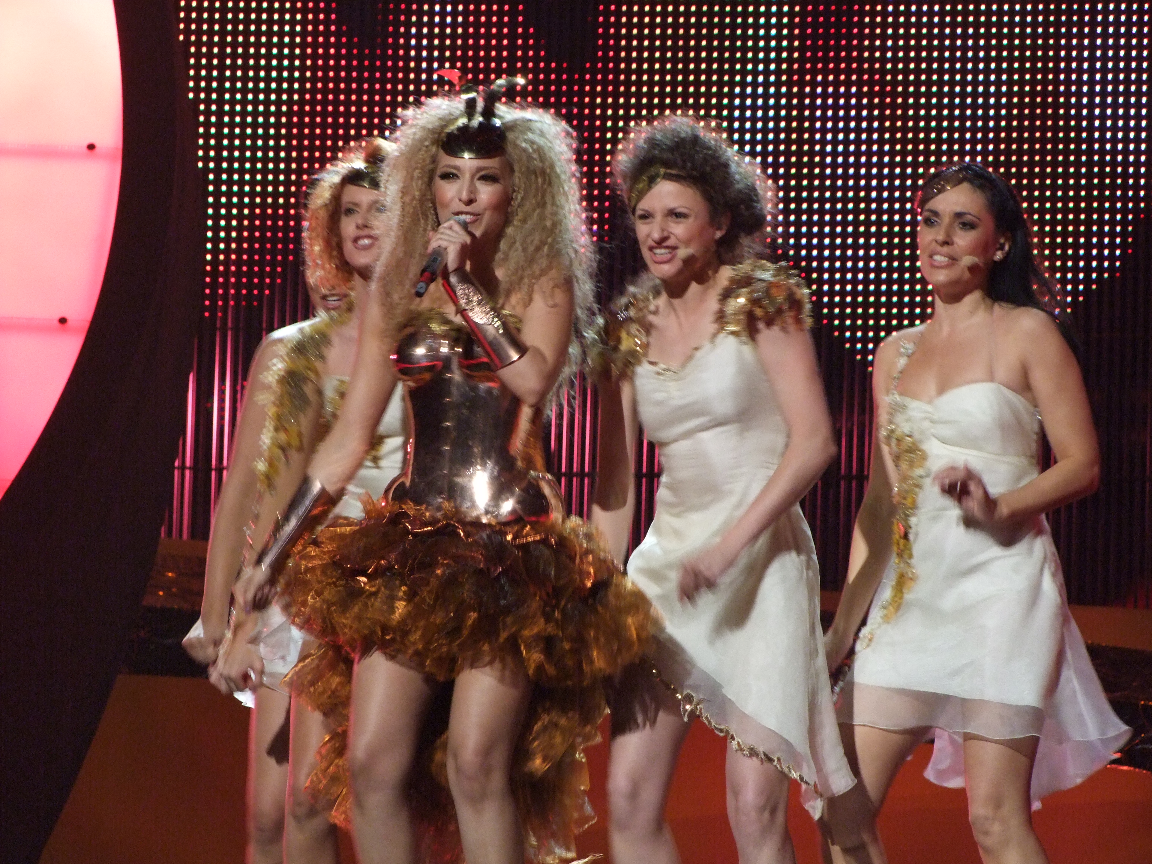 "CASANOVA" - Gisela - Andorra 2008